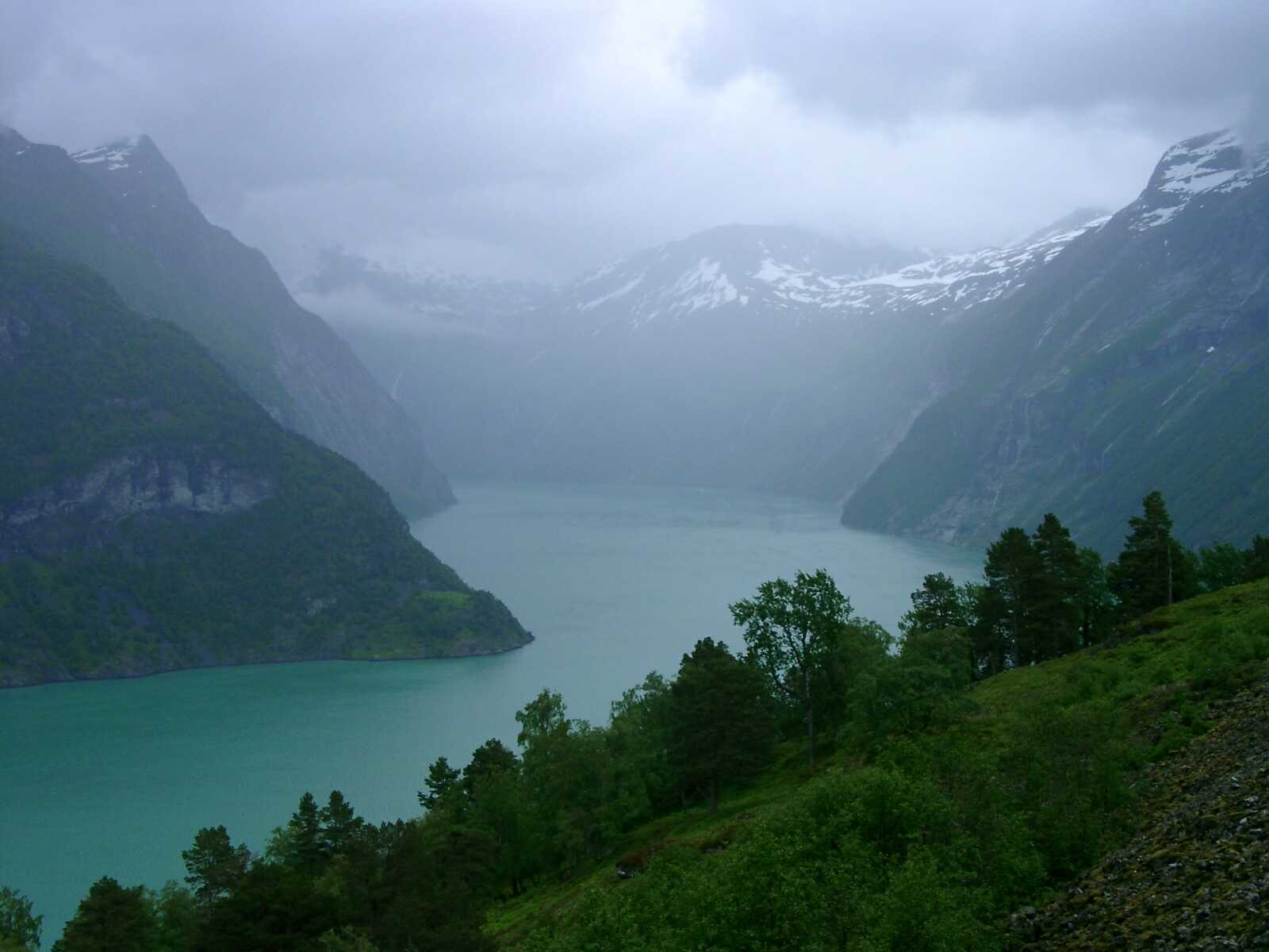 Blick über den Sognefjord